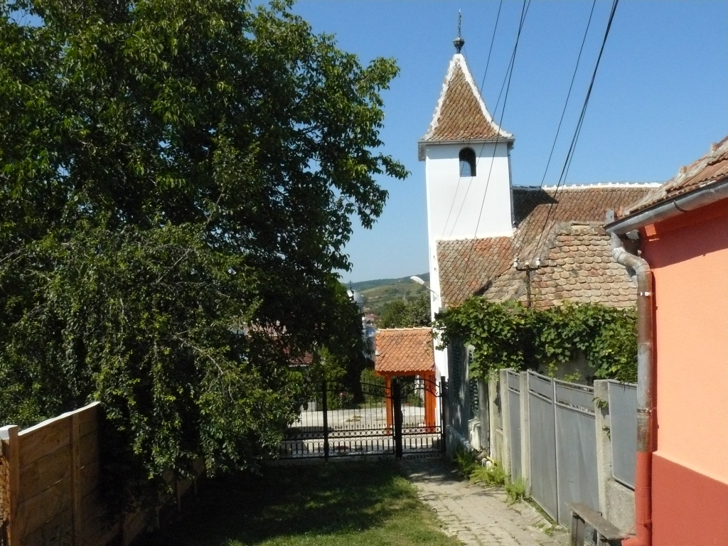 Biserica " Sf. Nicolae"